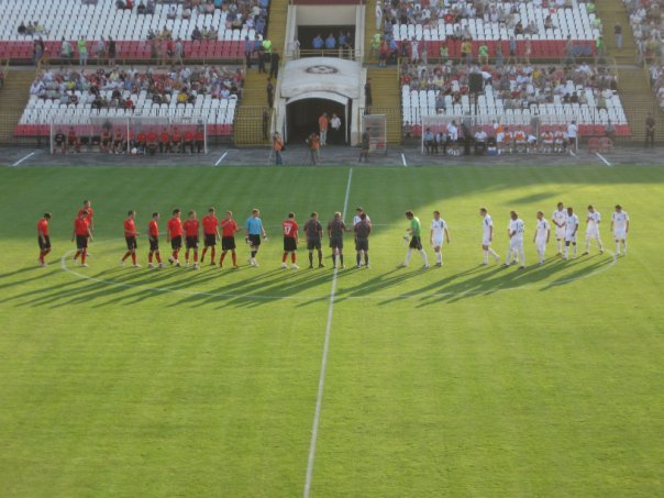 Футбольный матч